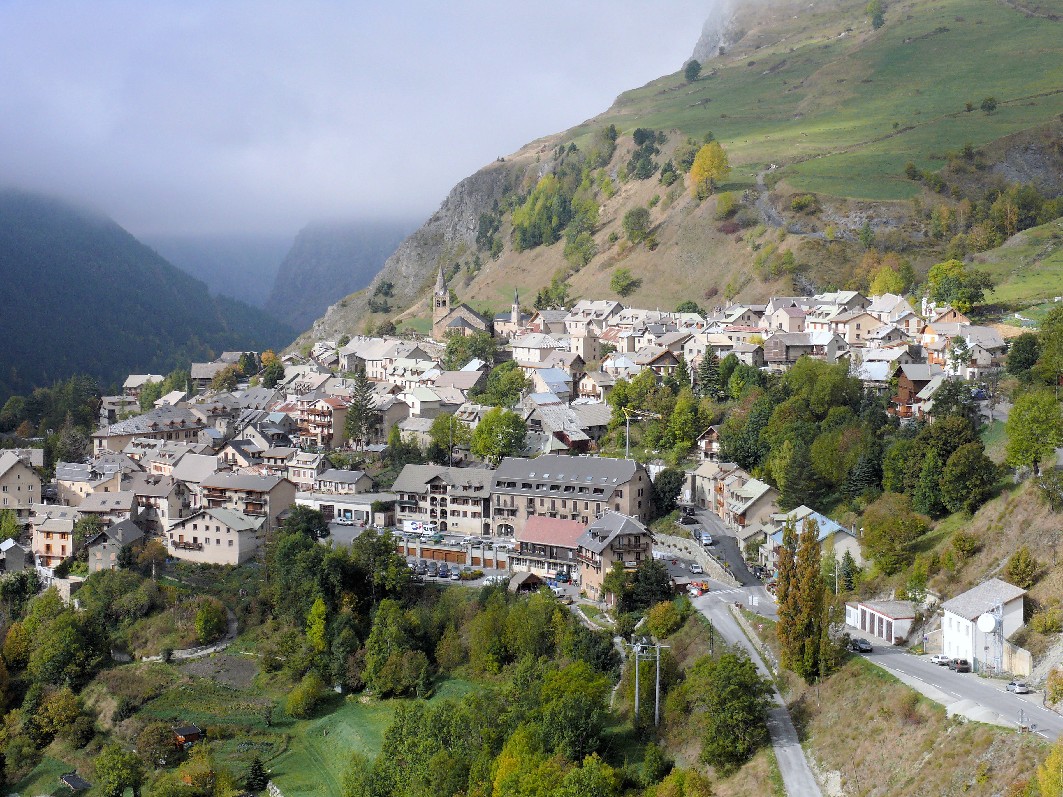 La Grave - Vue d'ensemble